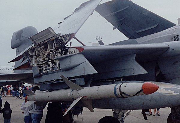 US EA-6B